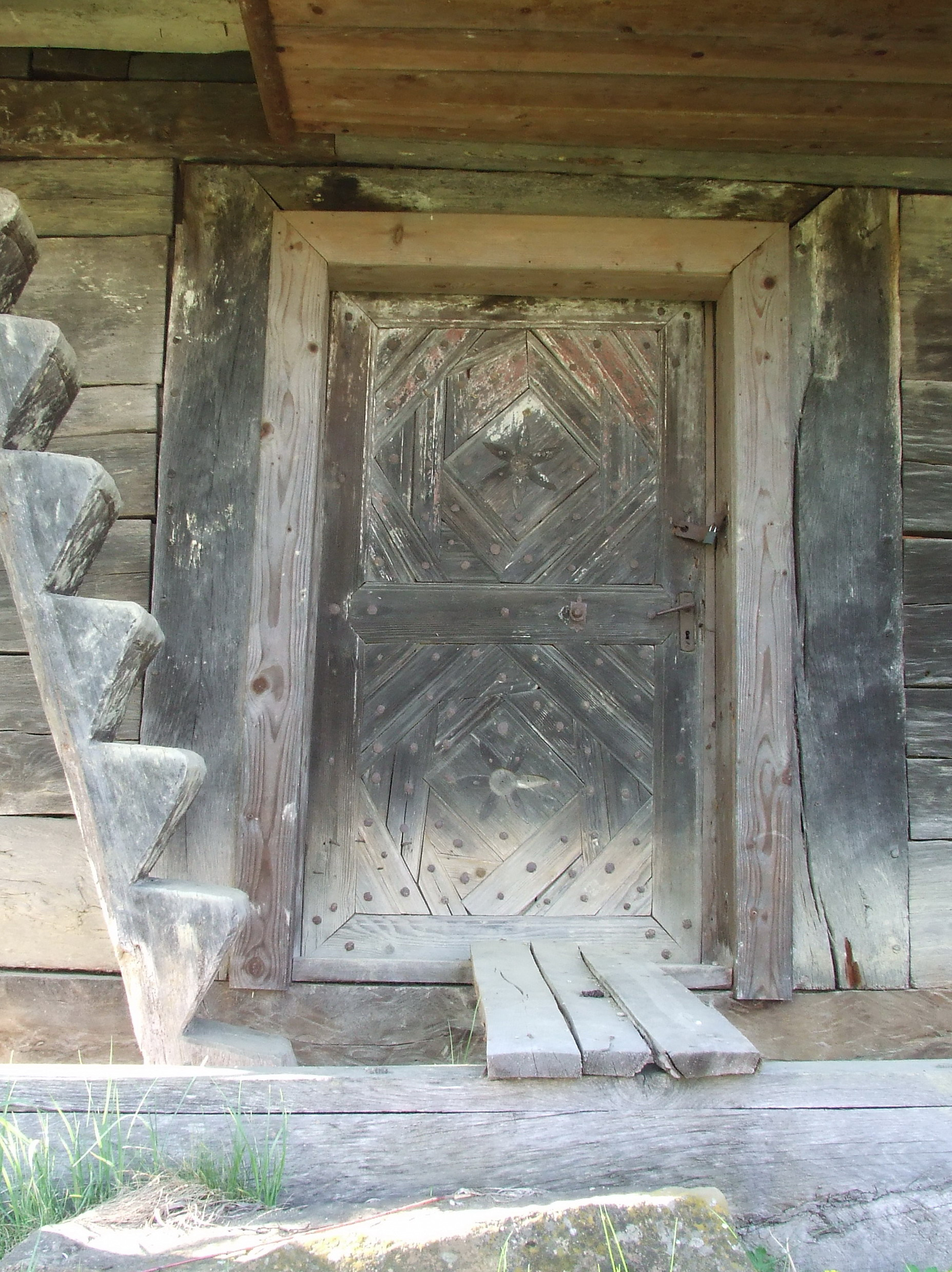 Biserica de lemn din Noţig, judeţul Sălaj. Intrarea în biserică.